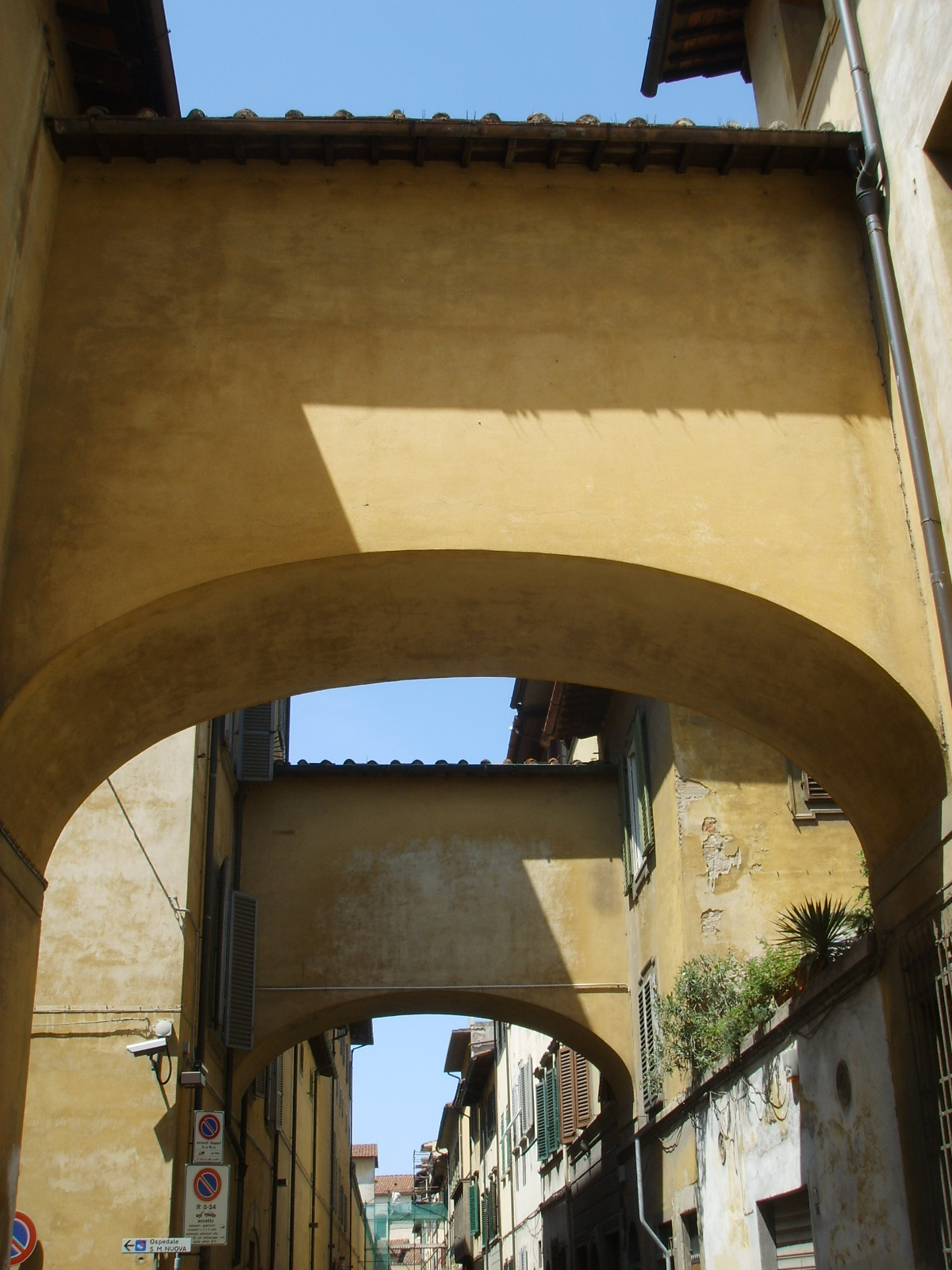 Ponti di maddalena, via laura